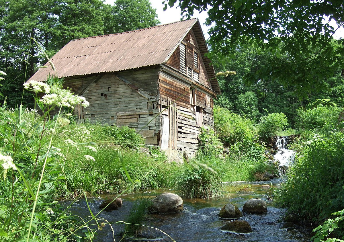 Buvęs Čiulėnų vandens malūnas